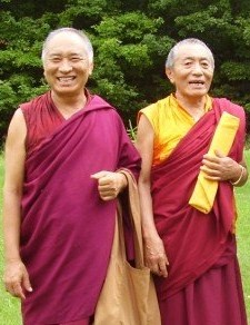 Khenpo Rinpoches: Khenchen Palden Sherab Rinpoche and Khenpo Tsewang Dongyal Rinpoche